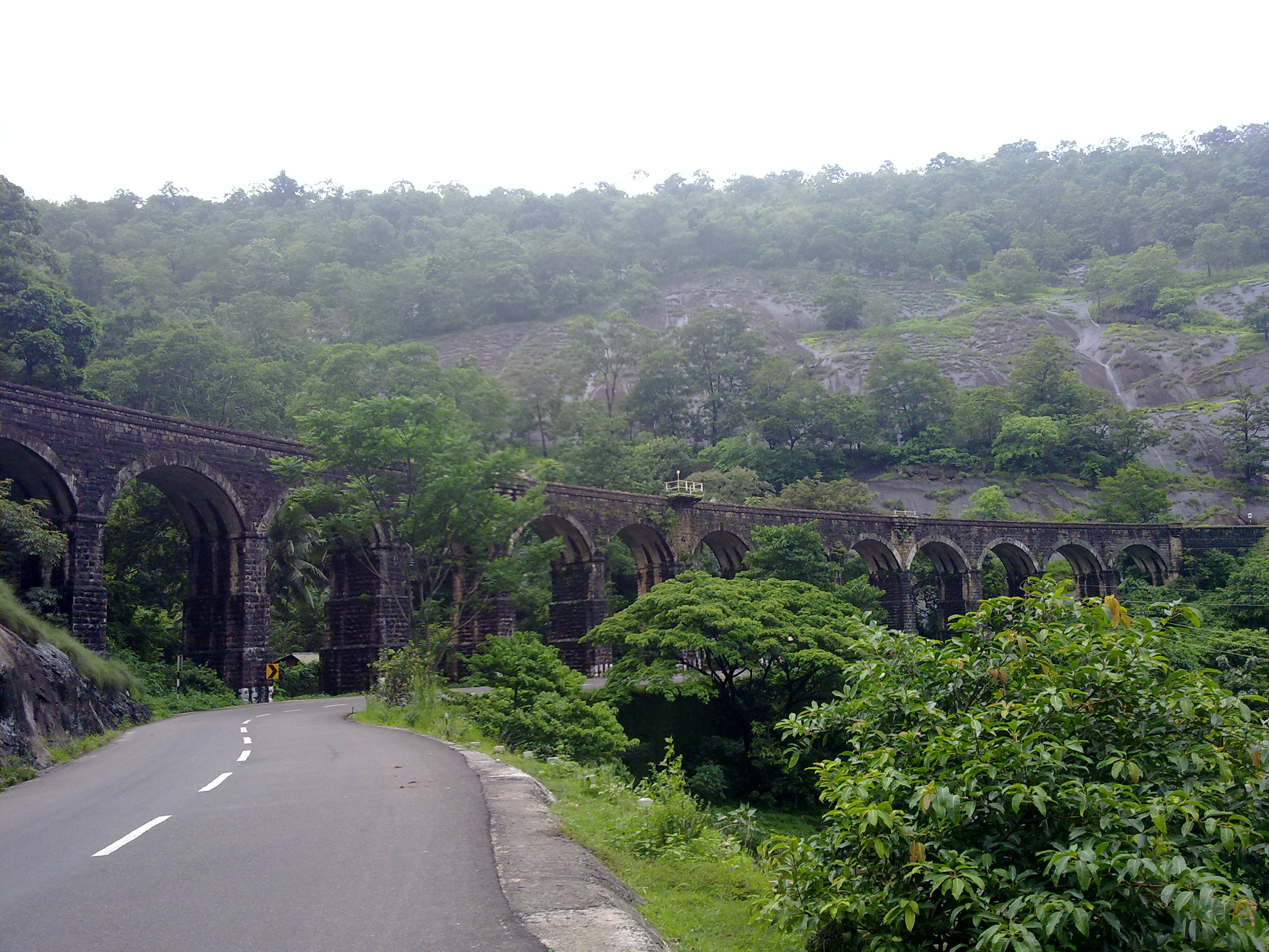 പതിമൂന്ന് കണ്ണറപ്പാലം